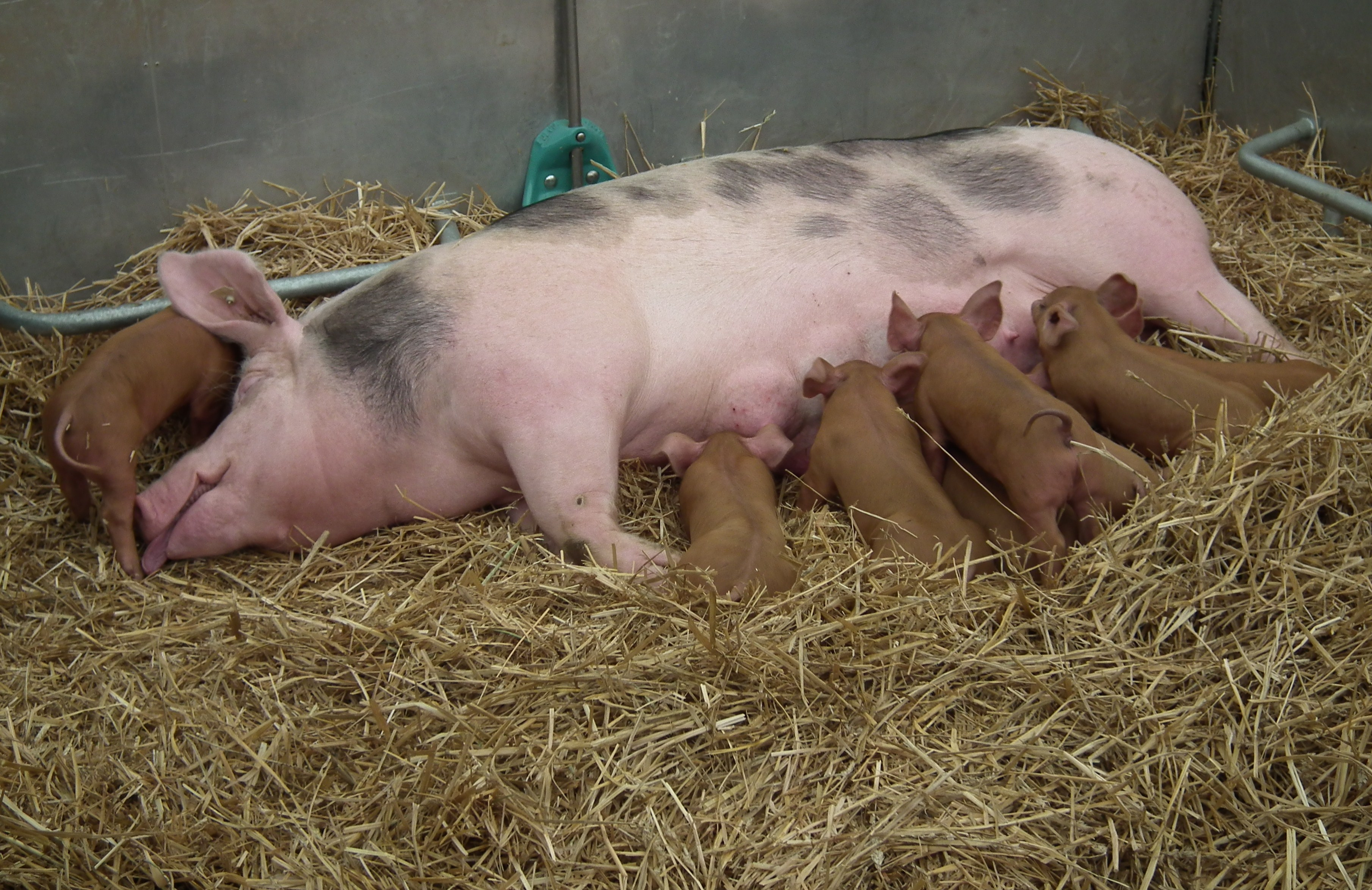 Saugende Ferkel German Piétrain